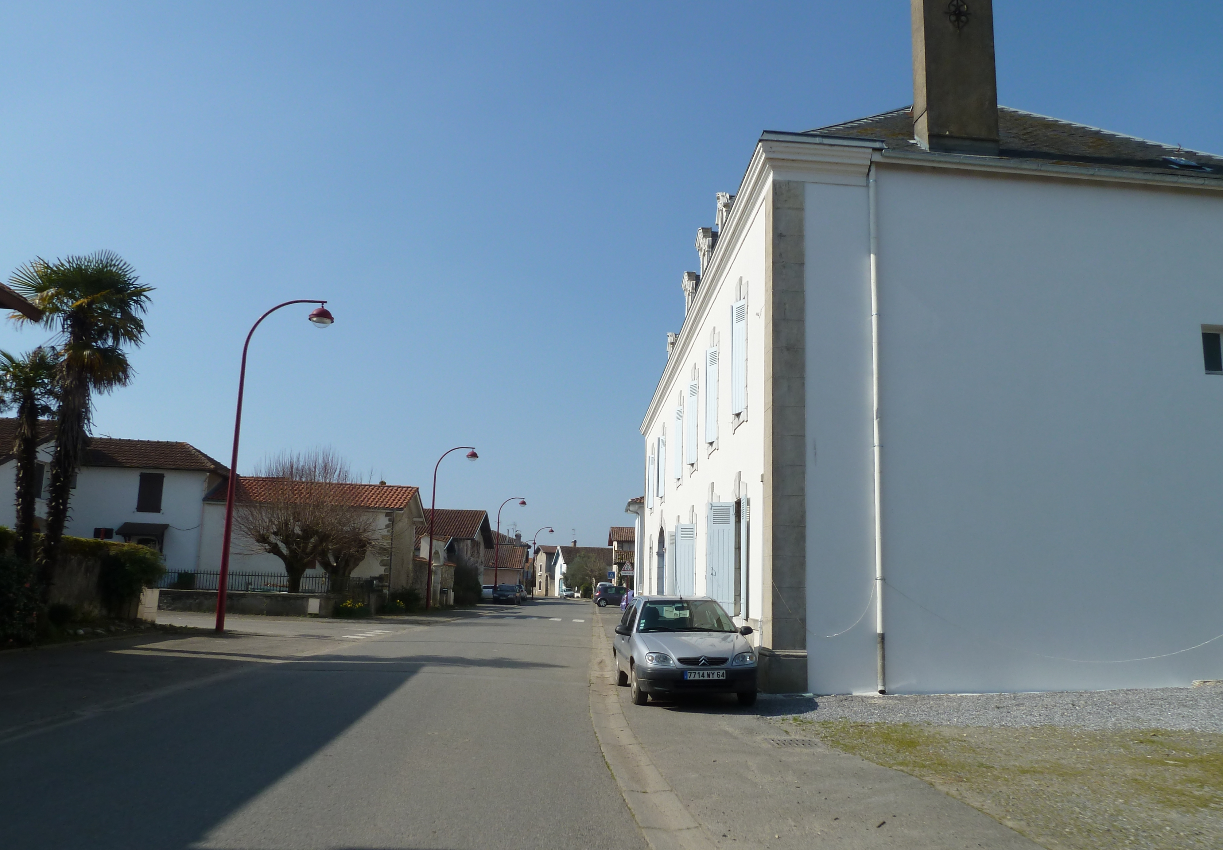 Lahontan